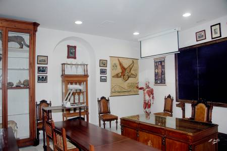 Aula histórica de didáctica de las Ciencias.Museo Aguilar y Eslava